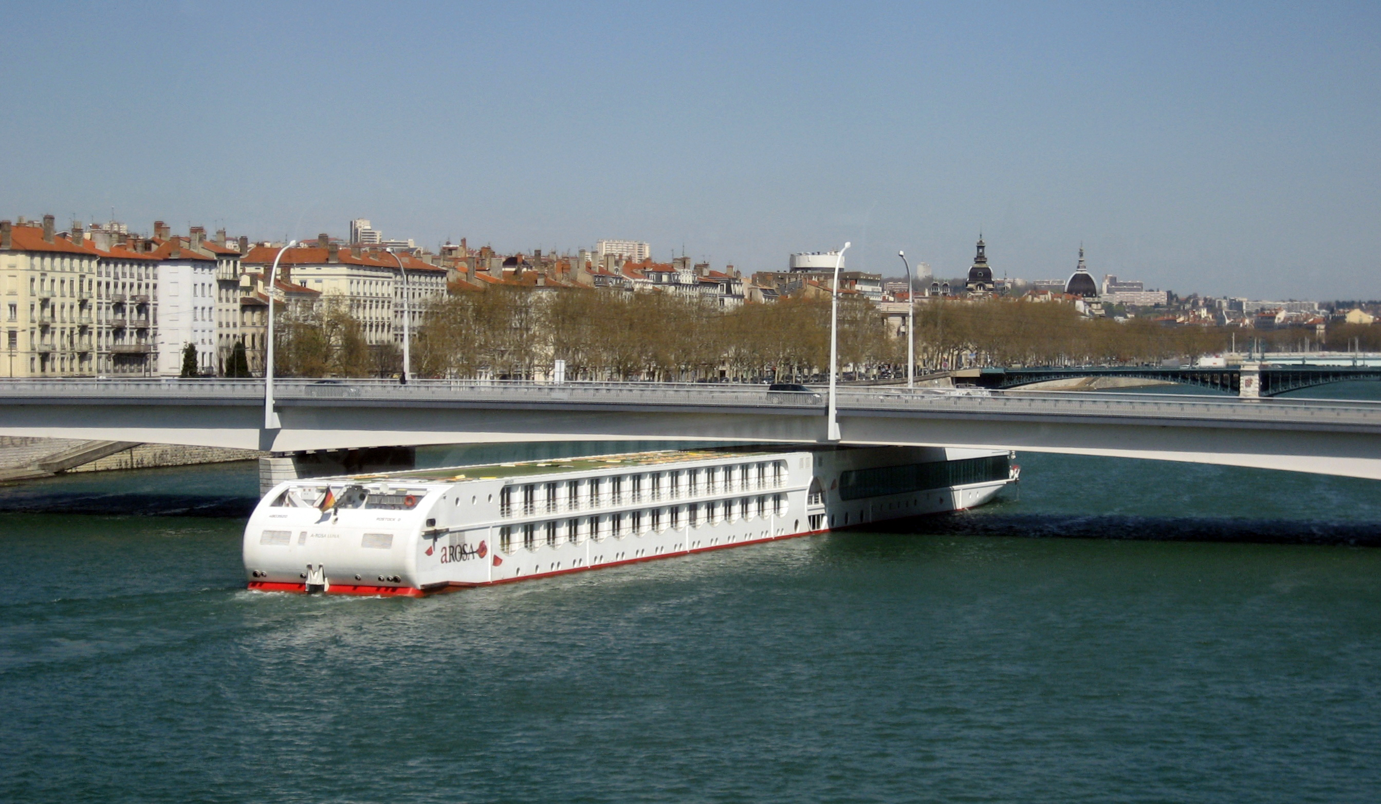 A-Rosa Luna auf Fahrt auf der Rhone. Le bateau allemand «Arosa Luna,» sur le Rhône, sous le pont Gallieni, dans la ville française, Lyon.